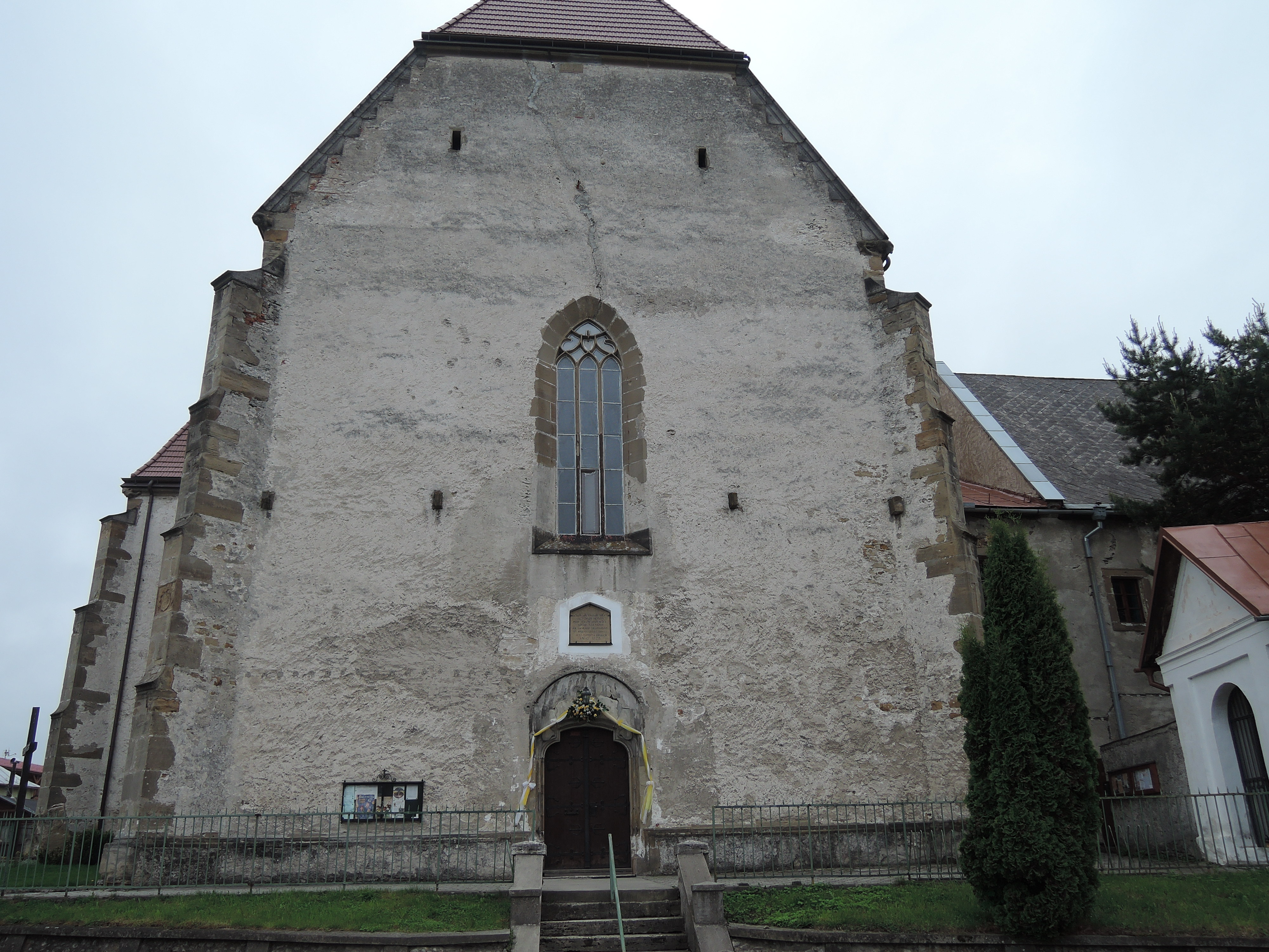 západný pohľad